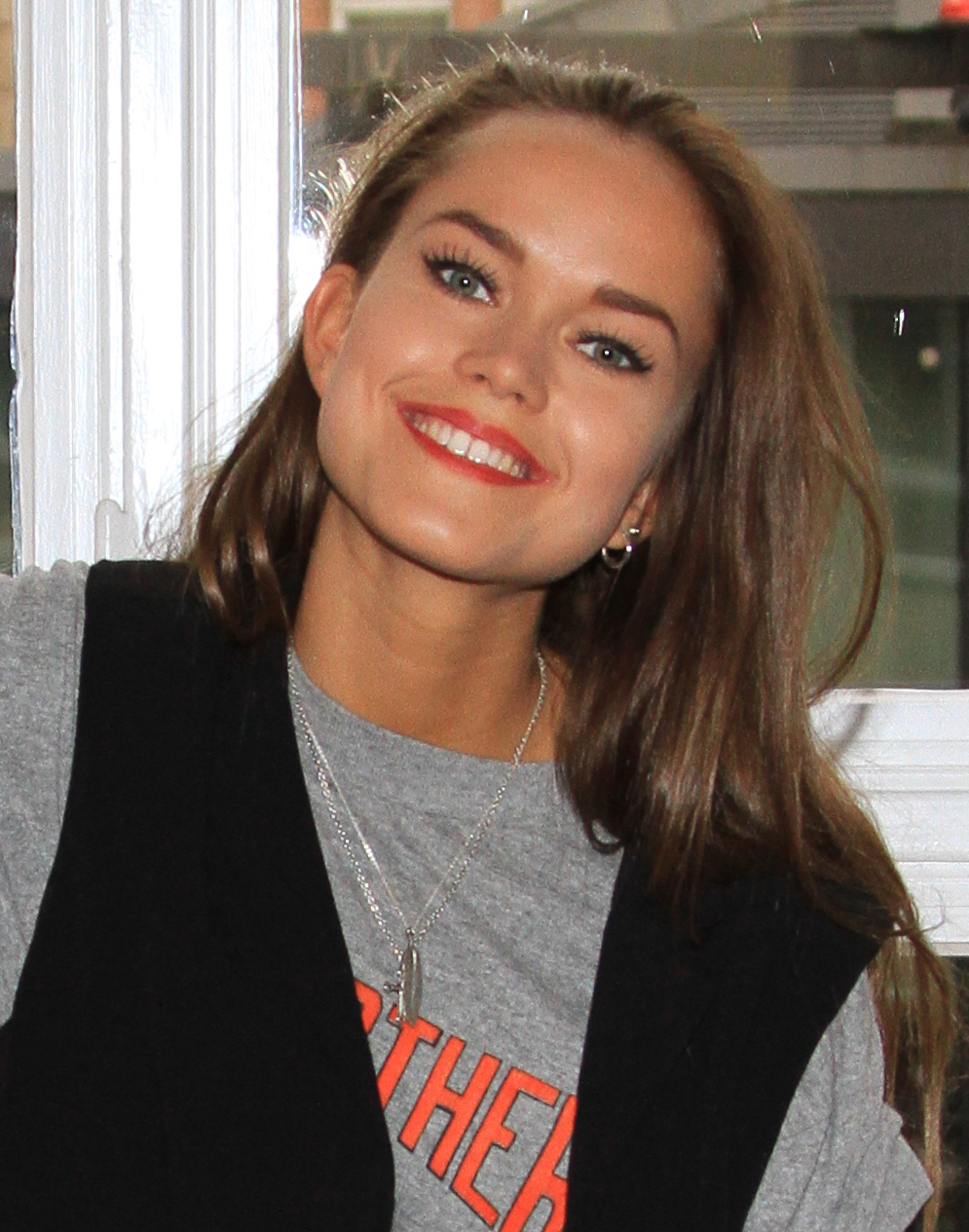 Amanda Mair (ausgesprochen: "Maier" 14. Juni 1994 ist eine schwedische Popsängerin.